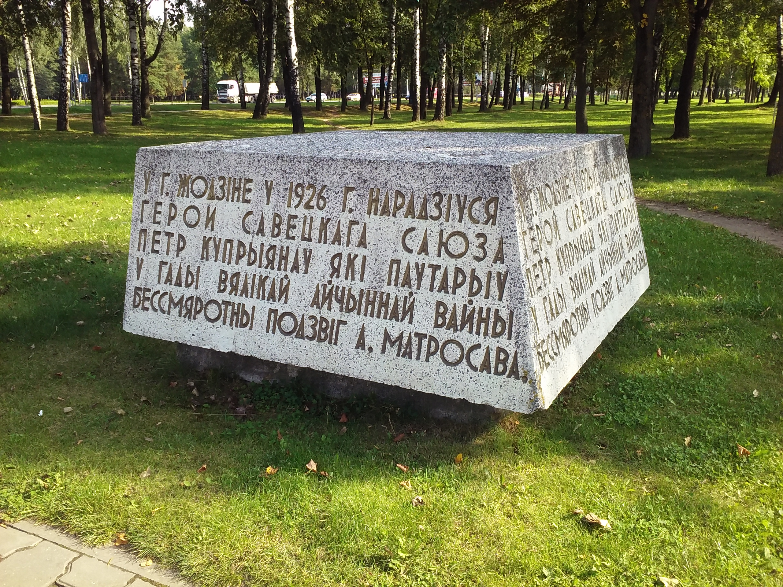 помнік Купрыянаву